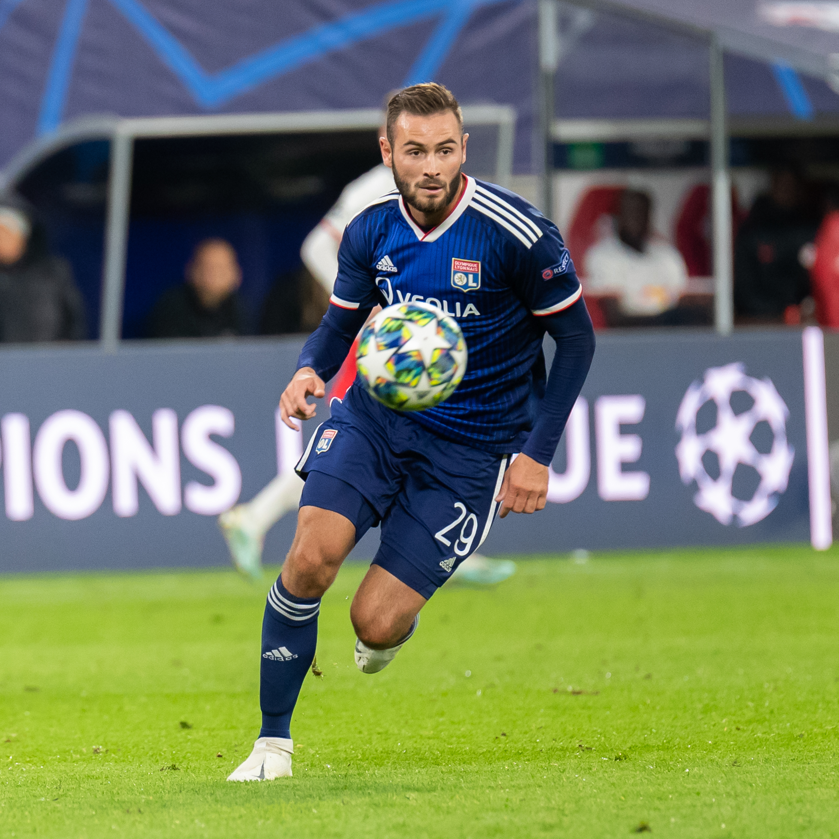 Fußball, Männer, UEFA Champions League, RB Leipzig - Olympique Lyonnais; Lucas Tousart (Olympique Lyonnais, 29); Freisteller, Einzelbild, Aktion, action